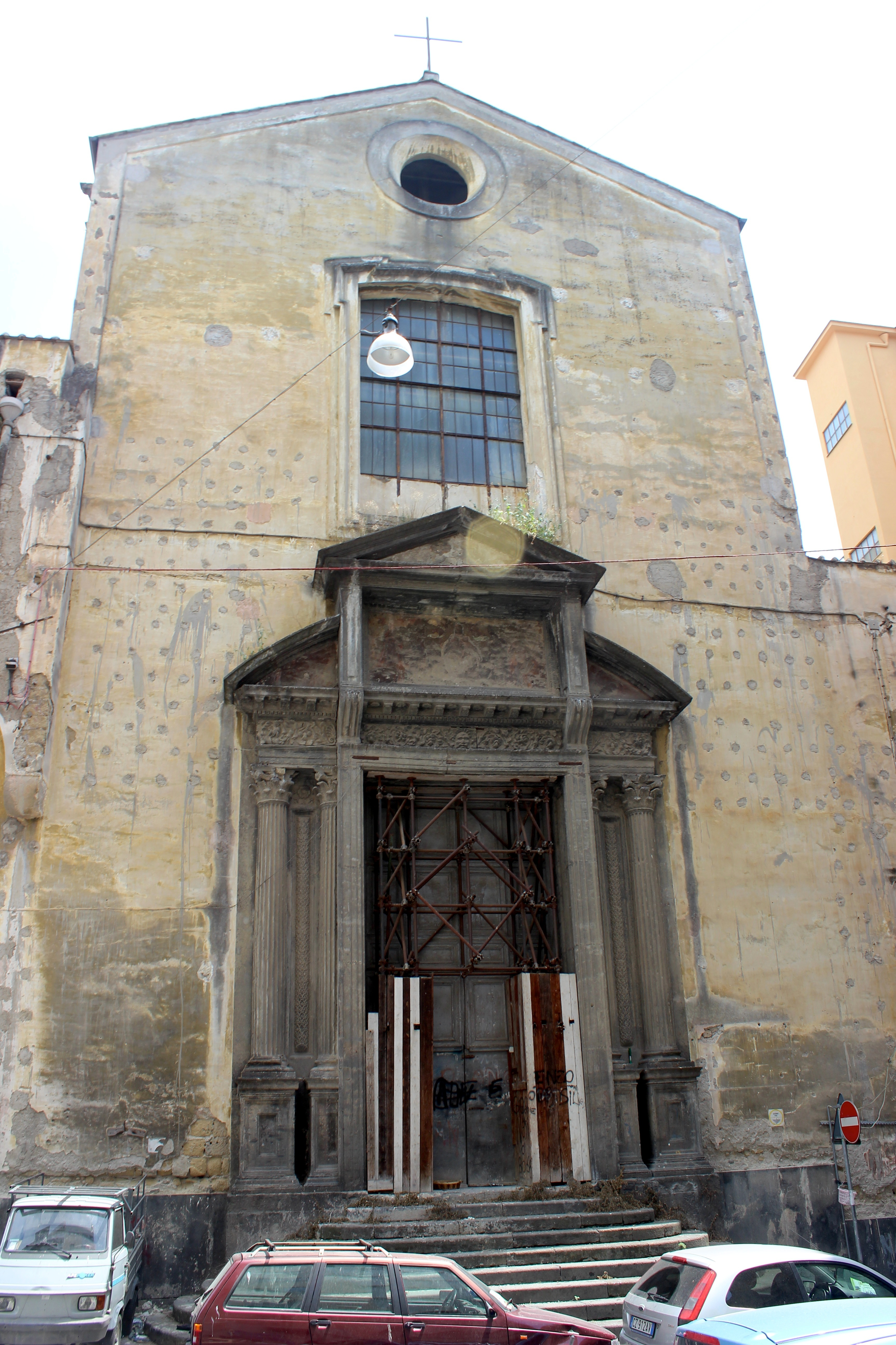 Nápoles. Fachada de la iglesia de Santa Maria delle Grazie a Caponapoli.